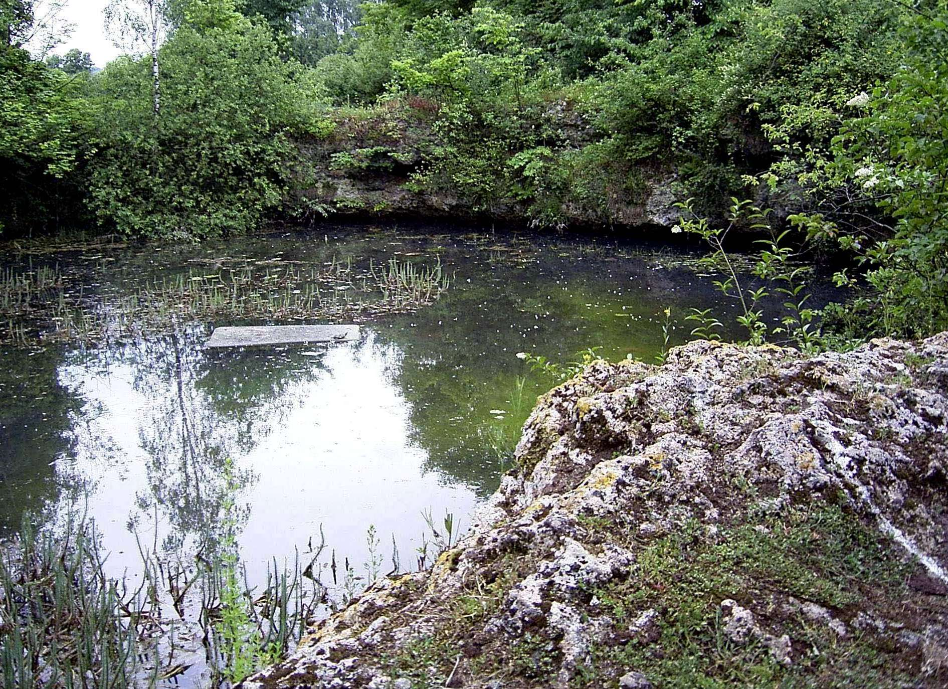 Kraterteich mit Kalksinter-Ringwall (Naturdenkmal) im Vogelpark am Krater